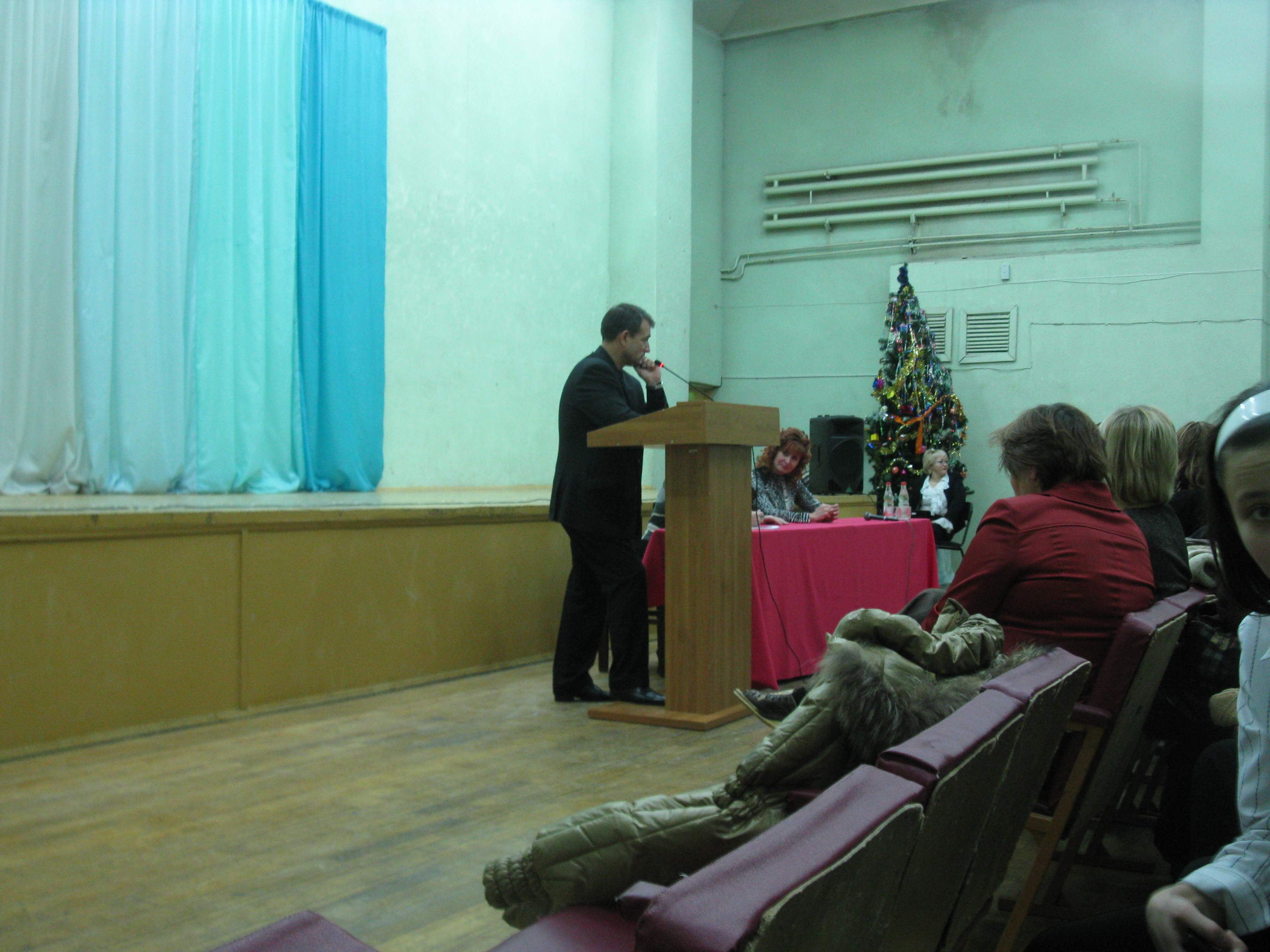 В. В. Сафьянов, мэр г. Орла, во время встречи с избирателями накануне досрочных выборов мэра 2010 года в школе №45 г. Орла